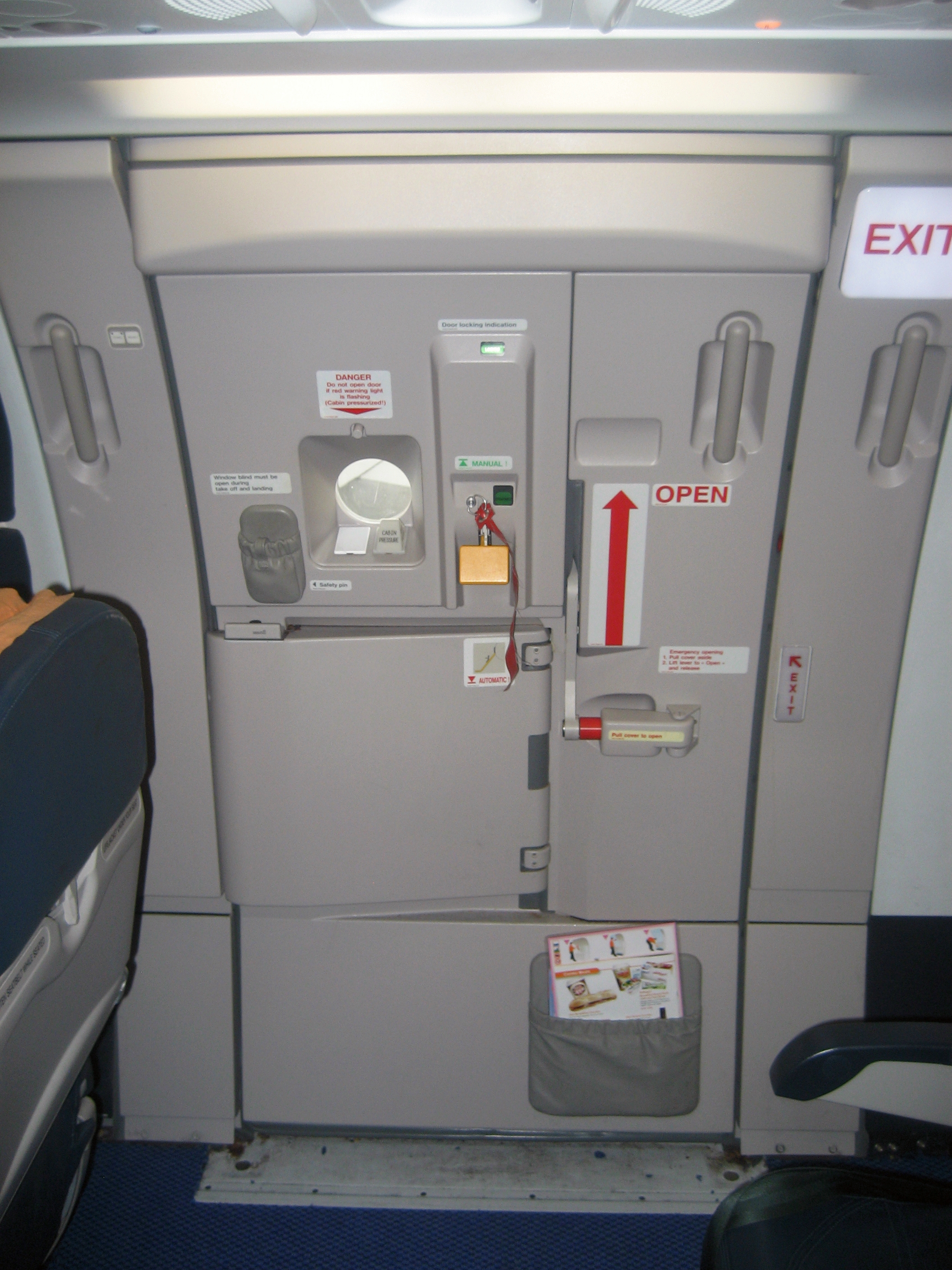 A321 Door 3R